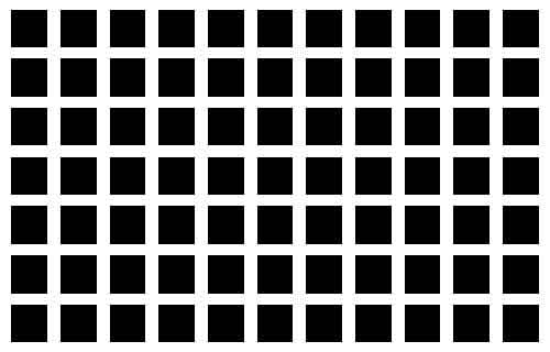 tzv. Hermannova mřížka - fyziologický mechanismus zvaný "lateral inhibition"